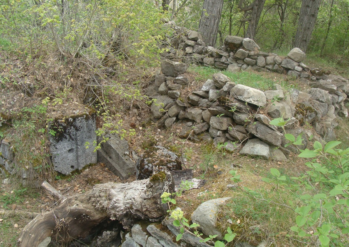 Ruines de l'ancien château de Montorcier sur la colline de Frustelle (commune de Saint-Jean-Saint-Nicolas, Hautes-Alpes)